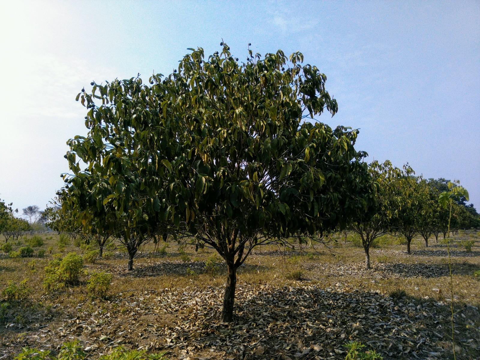 C. orinocense árbol adulto de cacay, de unos 6 metros de diámetro y 6 metros de alto